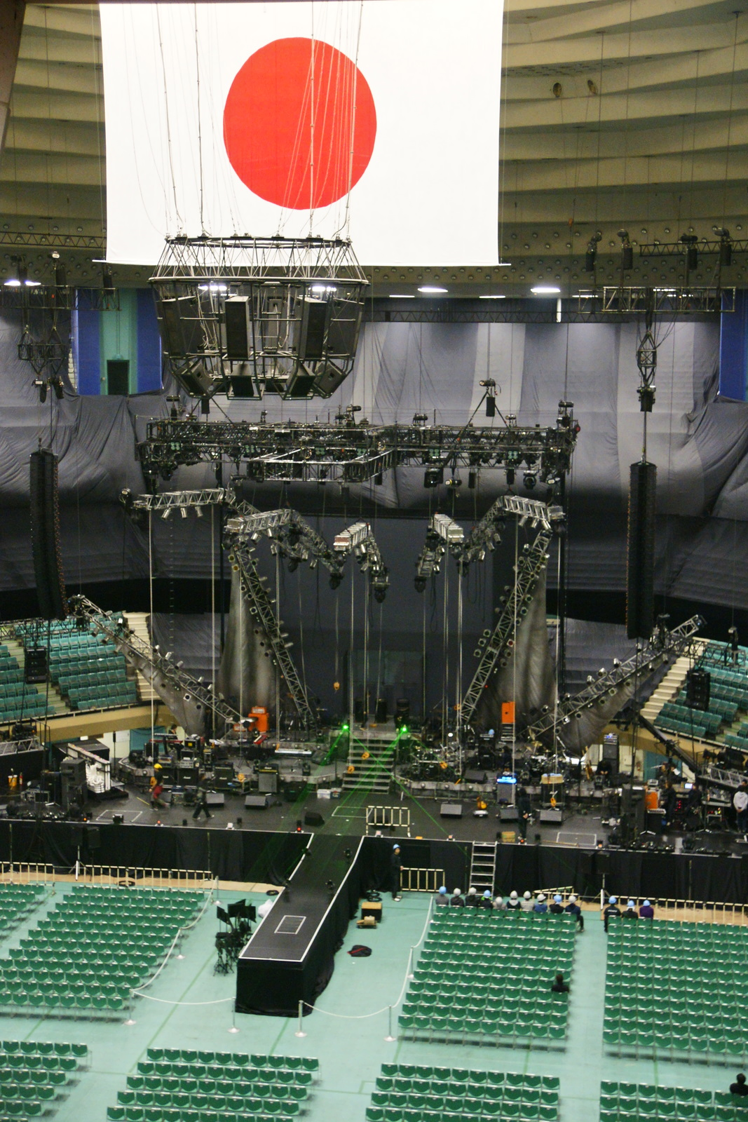 日本武道館の写真です。